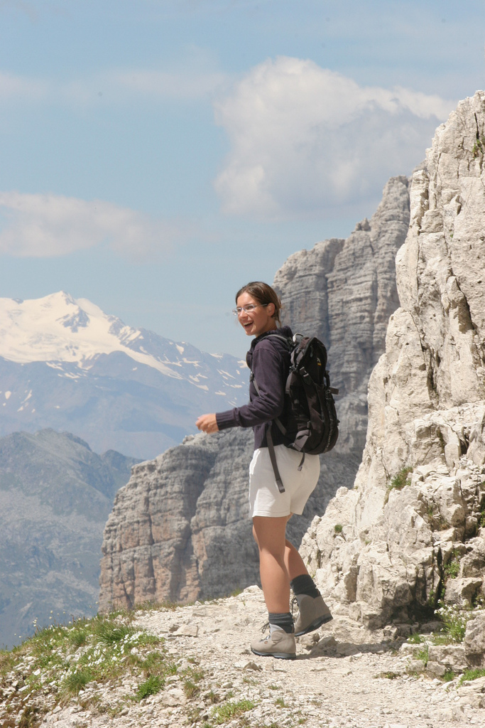 Trekking nas montanhas de Molveno, Trentino-Alto Adige, Itália.